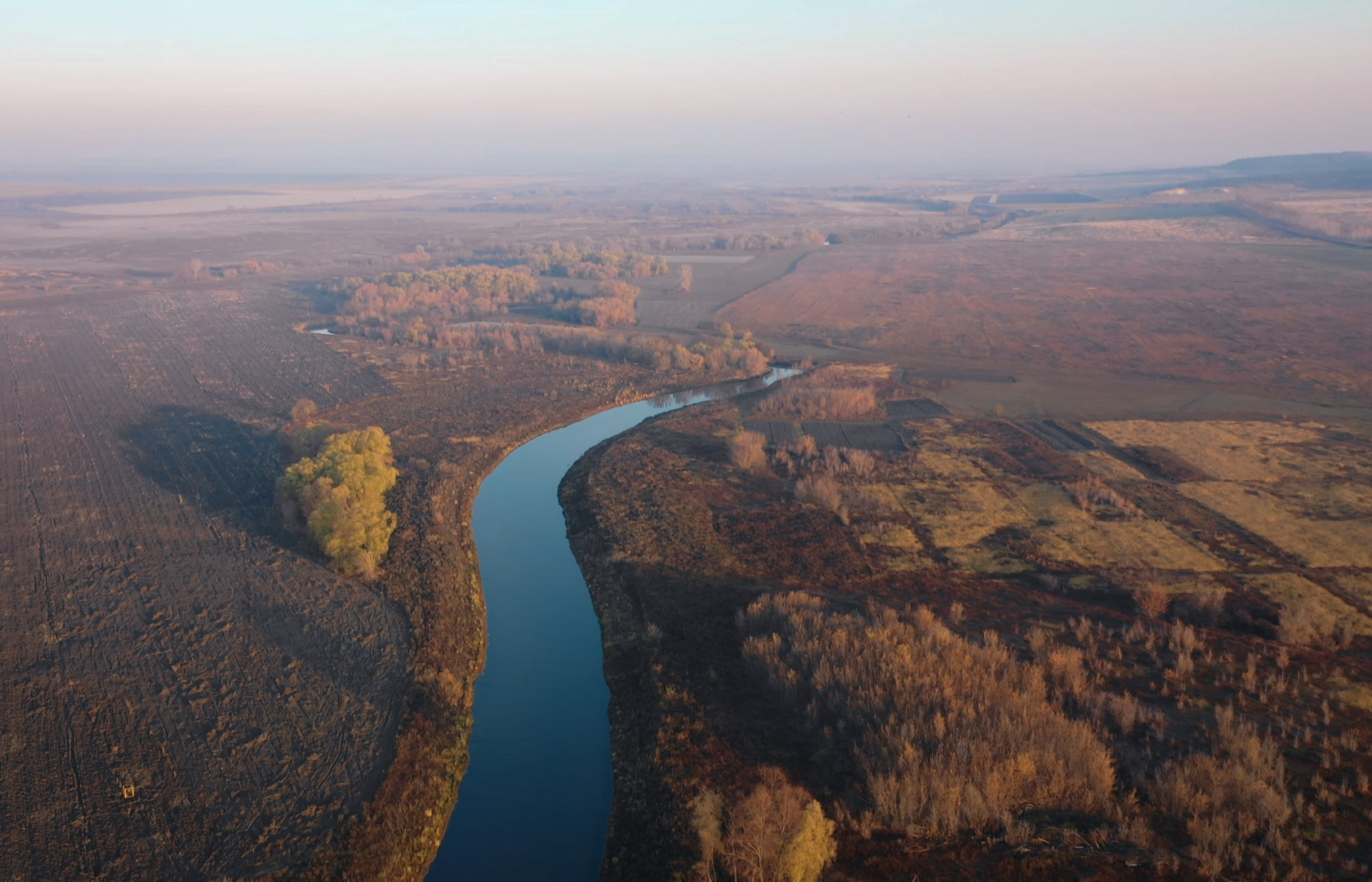 карсун